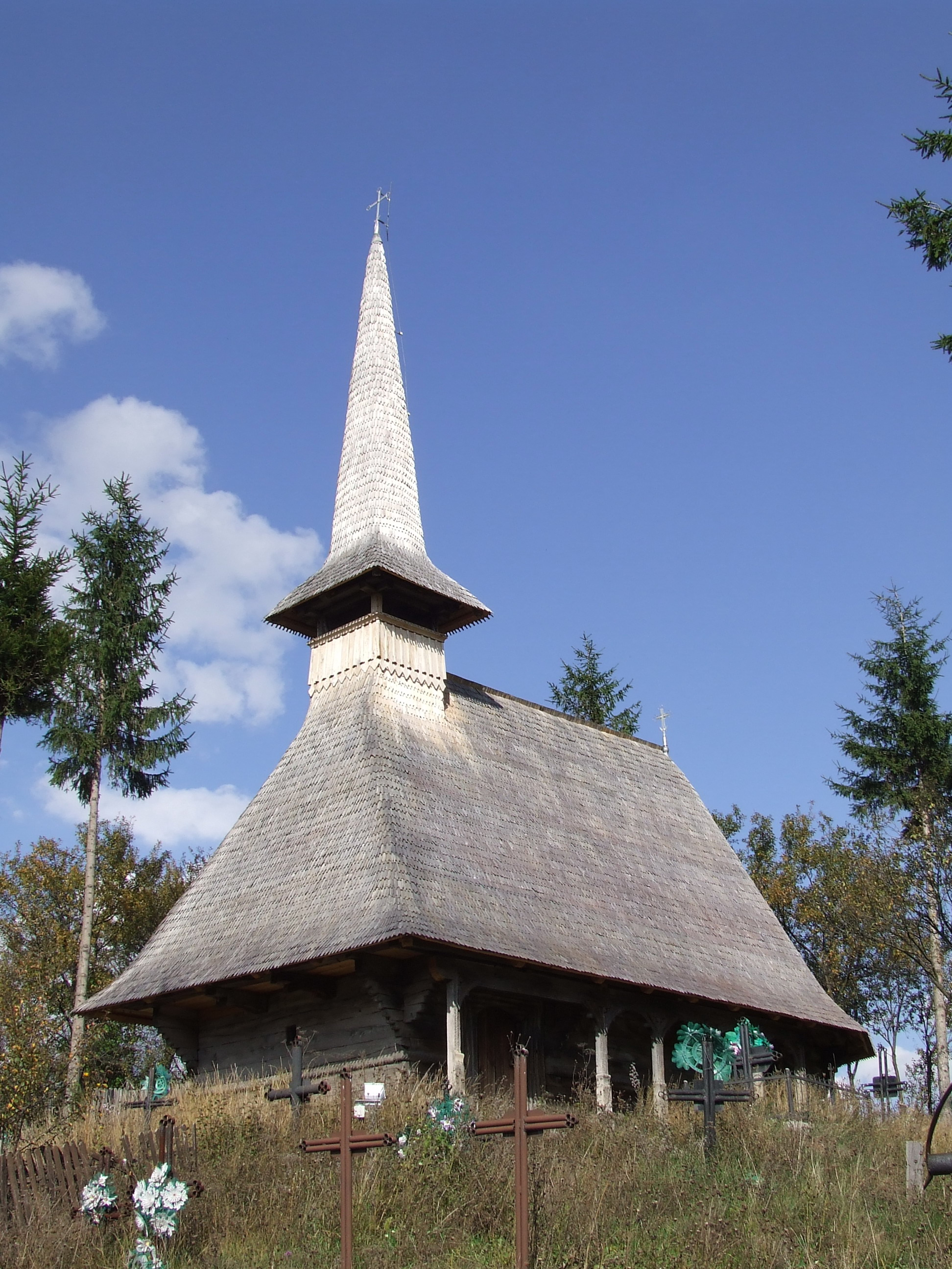 Biserica de lemn din Tusa, judeţul Sălaj. Autor: Bogdan Ilieş Data: octombrie 2007 Categorie:Biserici de lemn din Sălaj (imagini)